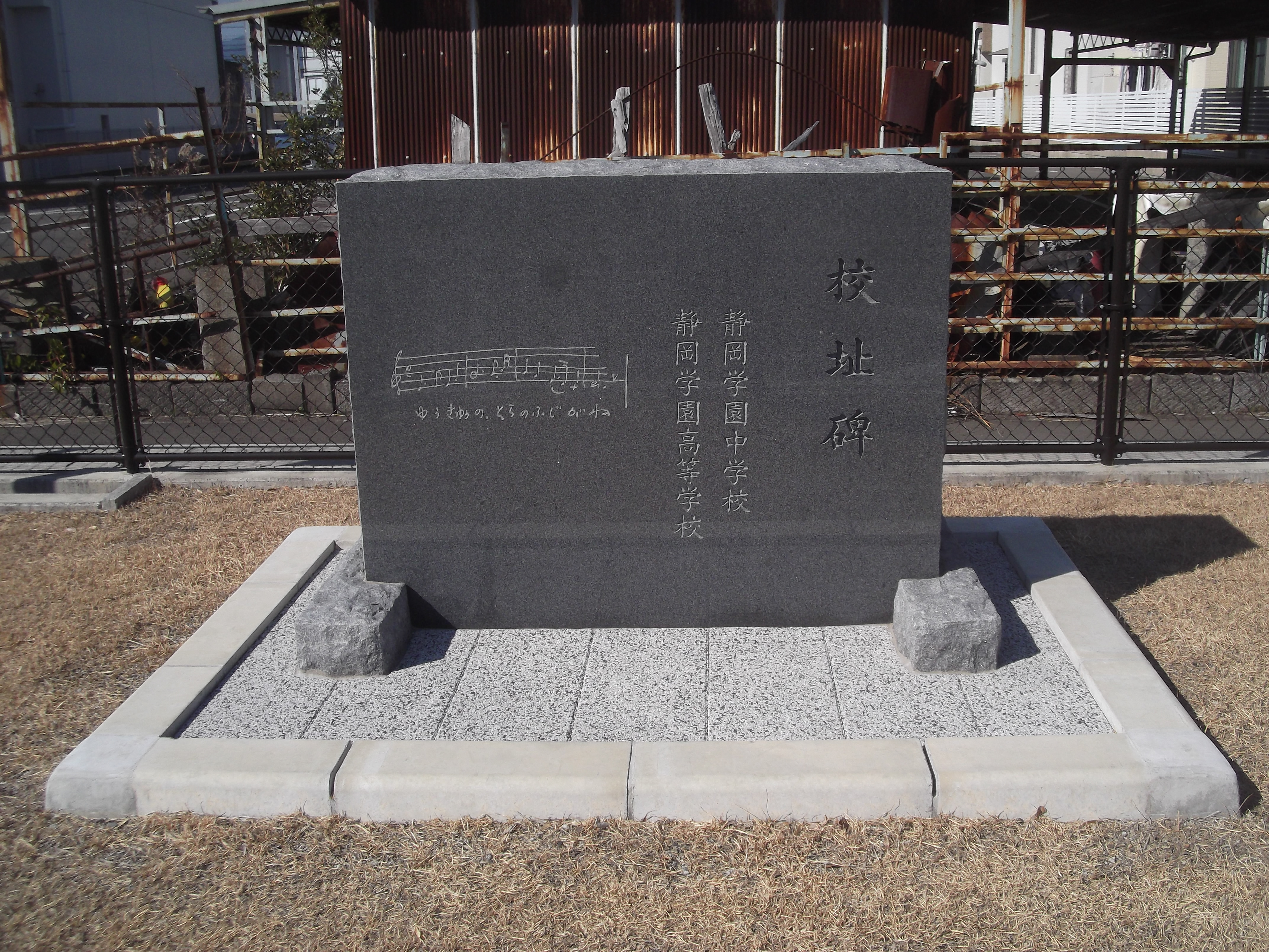 駿河区聖一色にある静岡学園校址碑